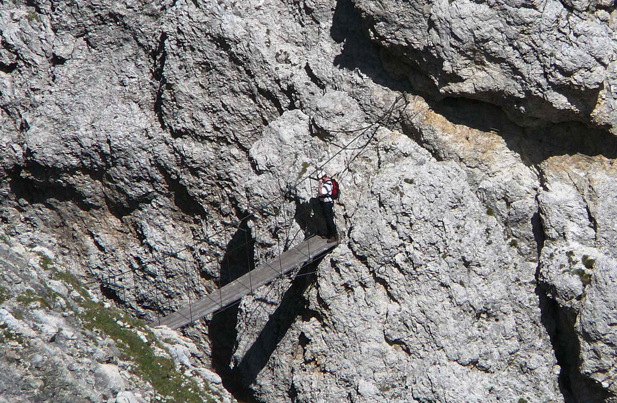 ferrata tridentina, ponte